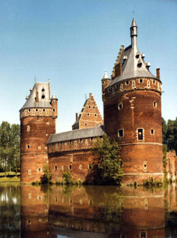 Photographie du château médiéval de Beersel